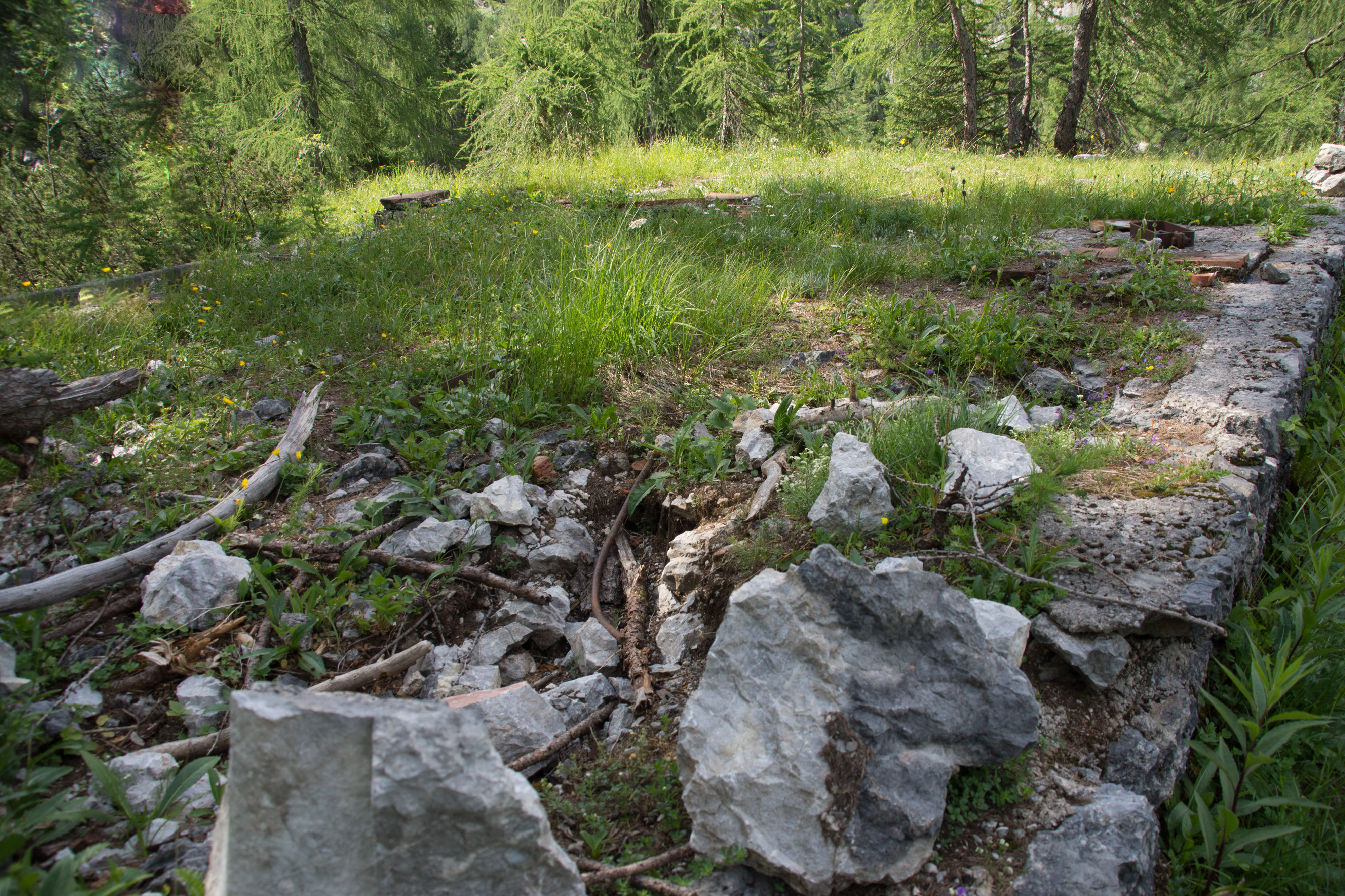 Verbliebene Fundamente der Elisabeth-Keimer-Hütte, einer Jagdhütte von Hermann Göring.